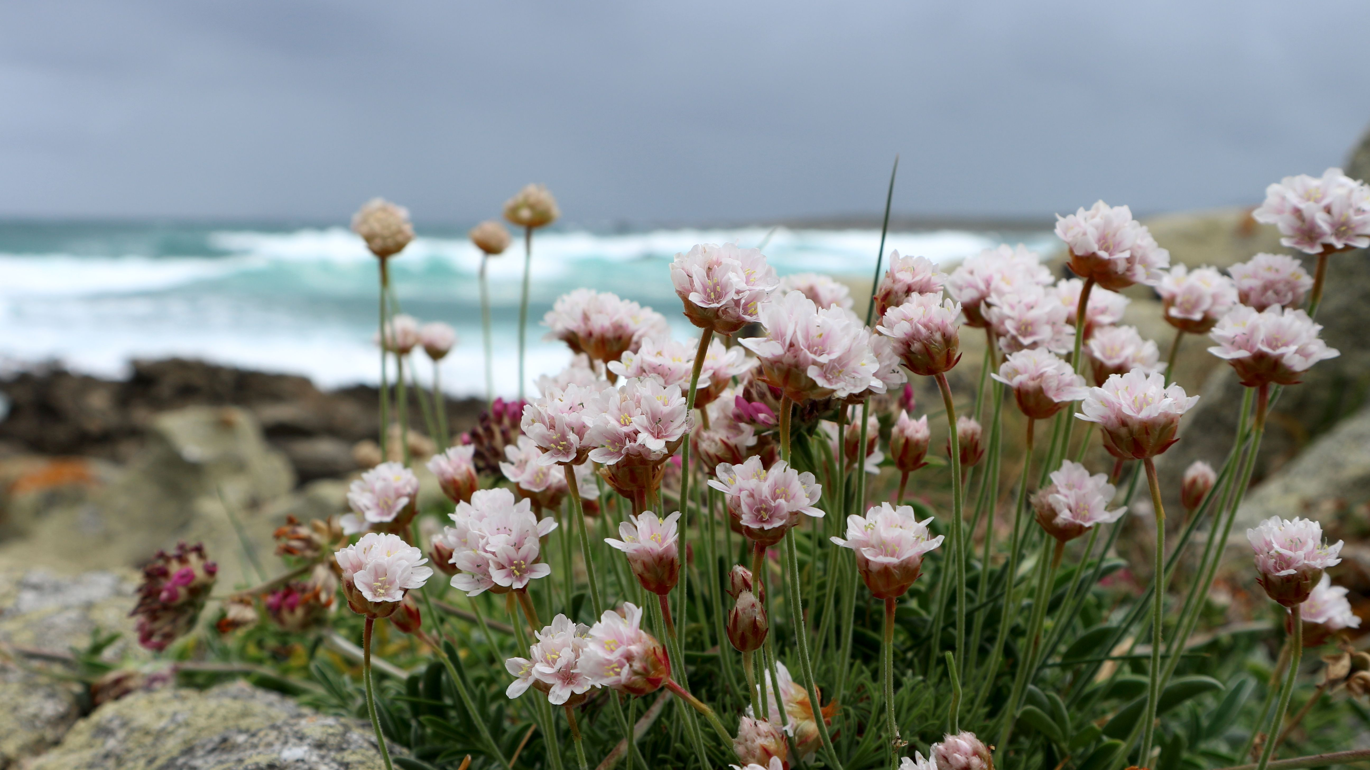 Armeria pubigera (?) no litoral do faro de Corrubedo. Ribeira, A Coruña.